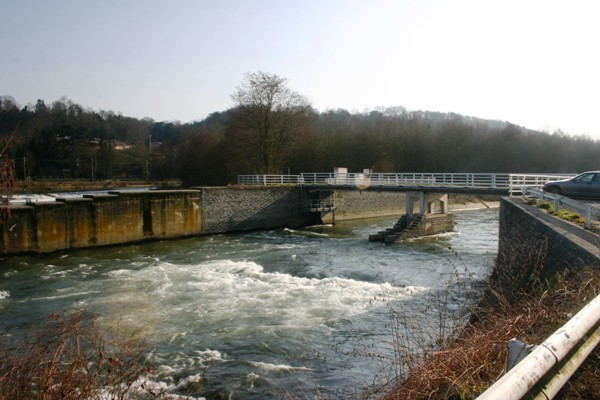 Le restes de l'écluse de Streupas